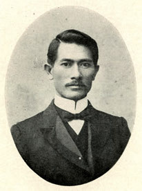 Bân-lâm-gú: Ko Chài-chiok 高再祝